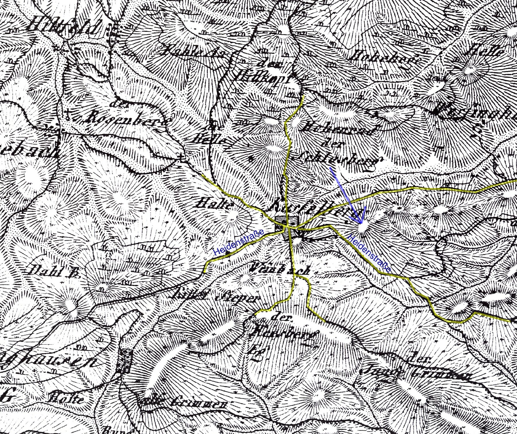 Ausschnitt aus der Karte eines Theils des Herzogtums Westphalen, der Grafschaft Marck und des Fürstenthums Waldeck